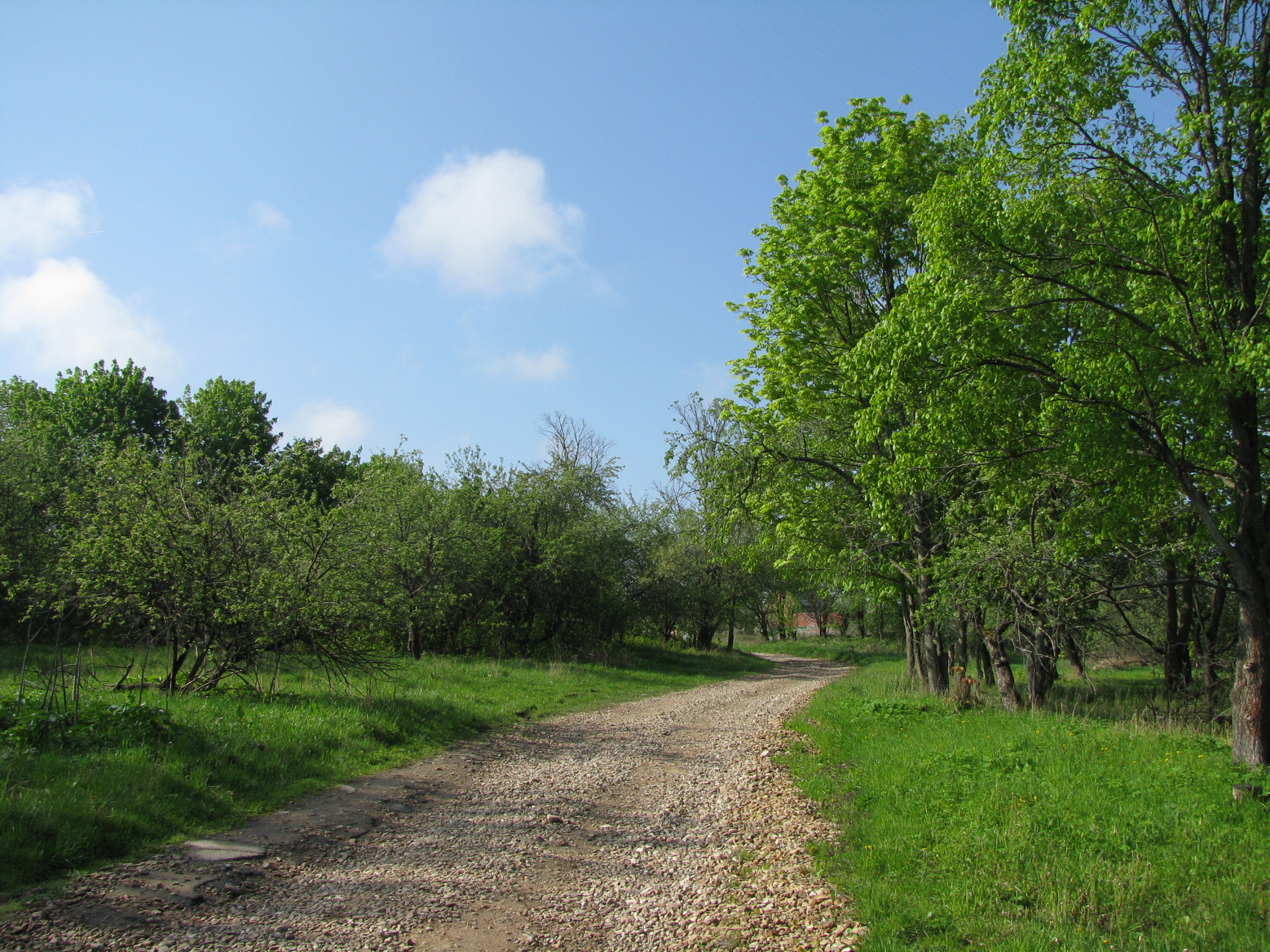 Podmoklovo village, Dolgorukovs' country estate (Serpukhov District, Moscow Region). Old Garden./Деревня Подмоклово (Серпуховский район Московской области), усадьба Долгоруковых. Остатки сада.